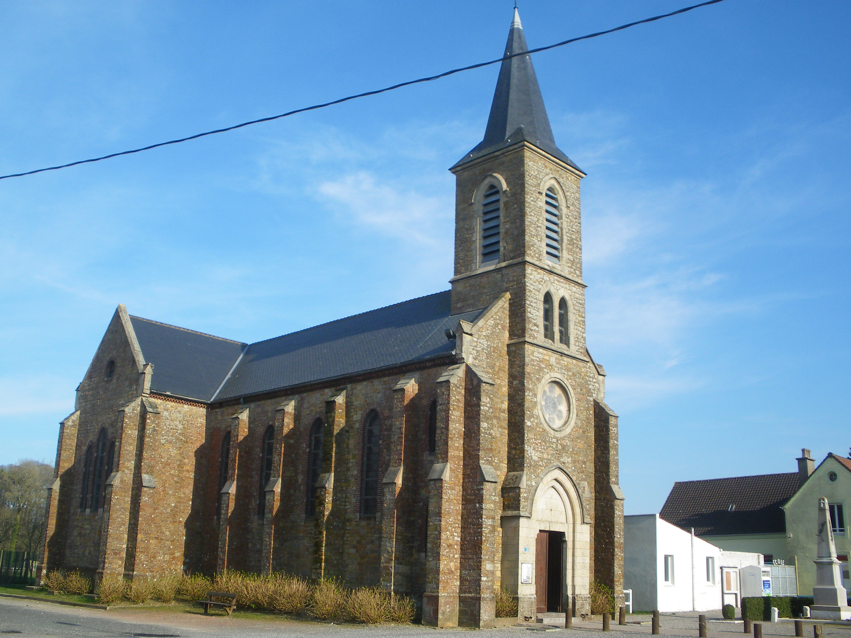 Vue de l'église Saint-Eloi de Caffiers.